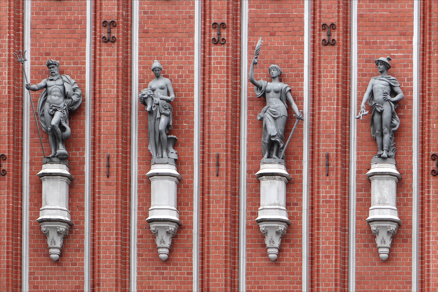 La Maison des Têtes Noires, détruite durant la dernière guerre, a été reconstruite et rouverte en 1999, elle se trouve sur la place de l'Hôtel de Ville. Le bâtiment initial date de 1334, il abritait la Grande Guilde de la ville hanséatique de l'époque, puis a été le siège de la confrérie des Têtes Noires (jeunes marchands allemands) dont le saint Patron est représenté sous les traits d'un Maure. Voir la maison de la même confrérie hanséatique à Tallinn : Cette maison en briques est de style renaissance néerlandais avec des éléments décoratifs datant du 19ème siècle.